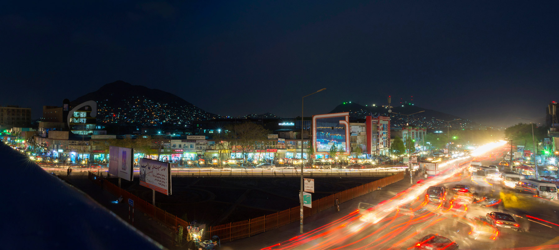 کوته سنگی